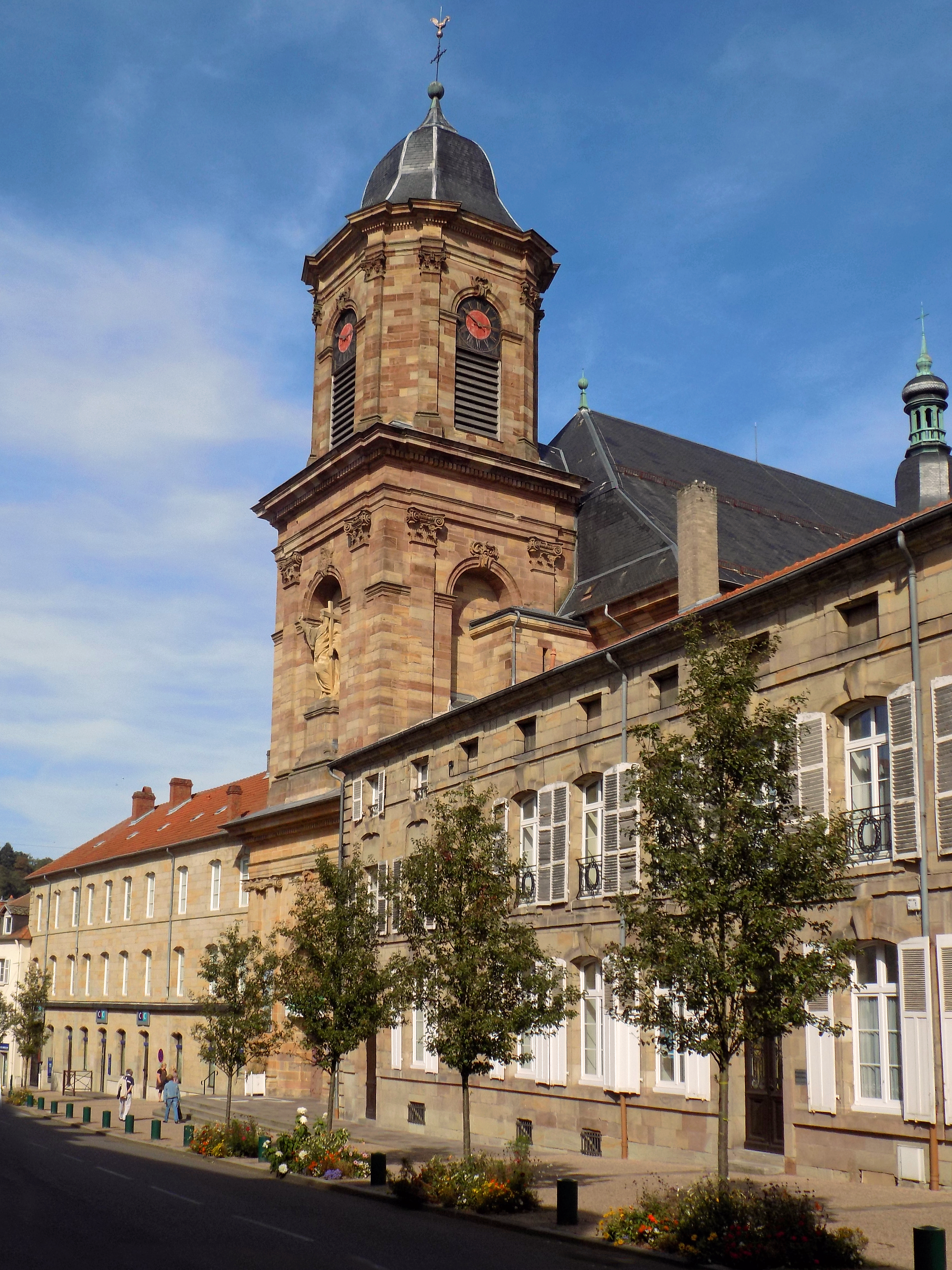 Abbaye Saint-Nabor (façade) de Saint-Avold (Moselle). Cette prestigieuse abbaye fondée au (VIe siècle) a été reconstruite au (XVIIe siècle) et (XVIIIe siècle); grandes orgues restaurées ; sur la façade de l'église abbatiale, statue représentant la Religion ou la Foi du sculpteur Pierre-François Le Roy (1739-1812) provenant du portail de Blondel de la cathédrale Saint-Étienne de Metz.